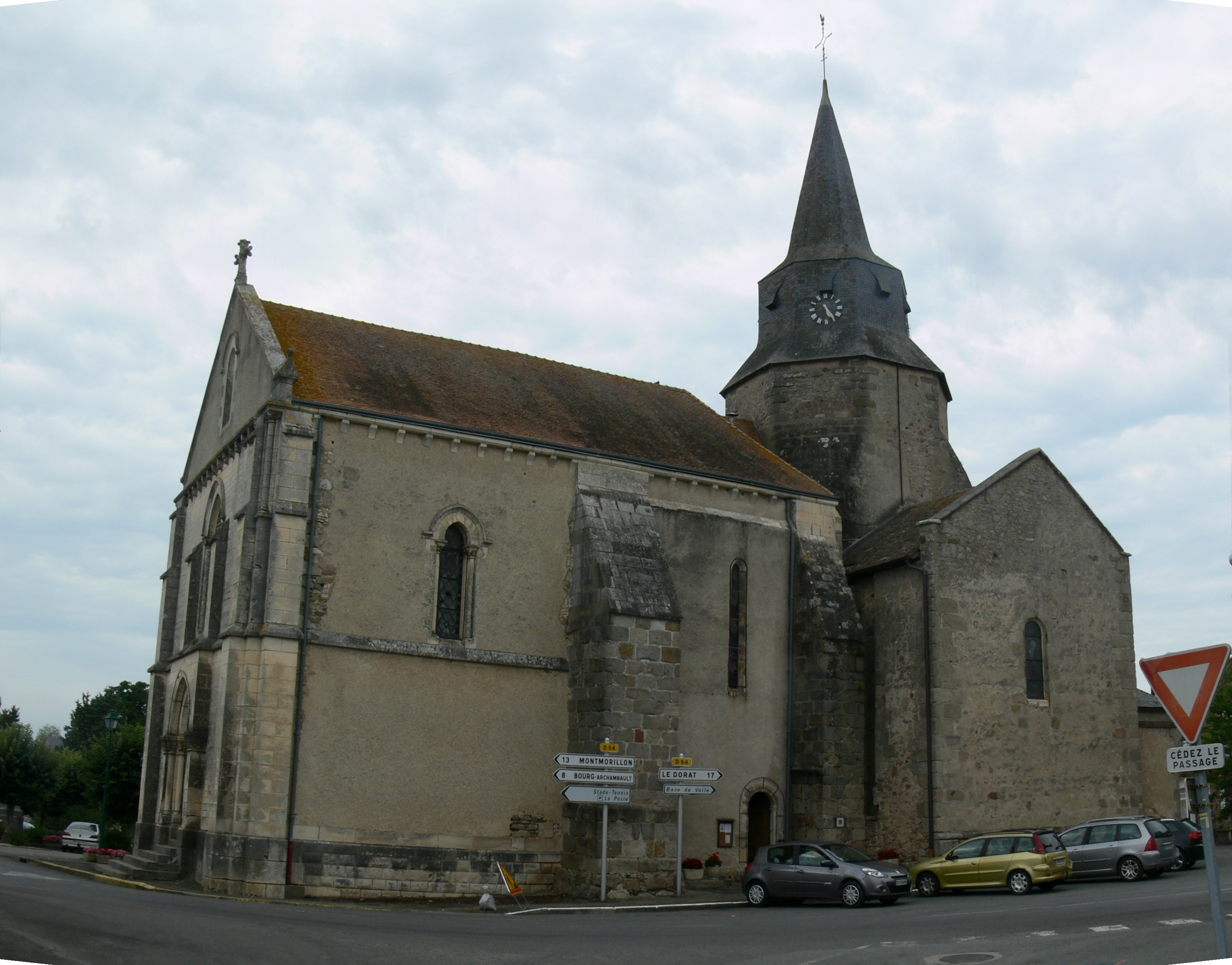 Église Saint-Maurice de Lathus-Saint-Rémy